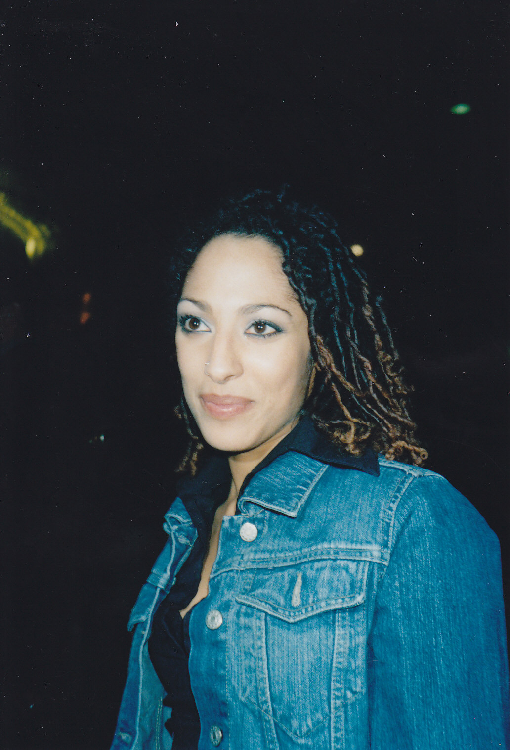 Jessica Wahls "Jess" von den No Angels